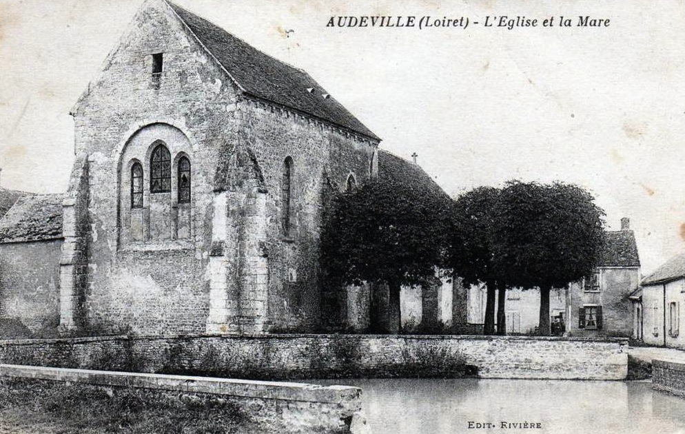 Eglise Saint-Sulpice d'Audeville, Loiret, Centre, France